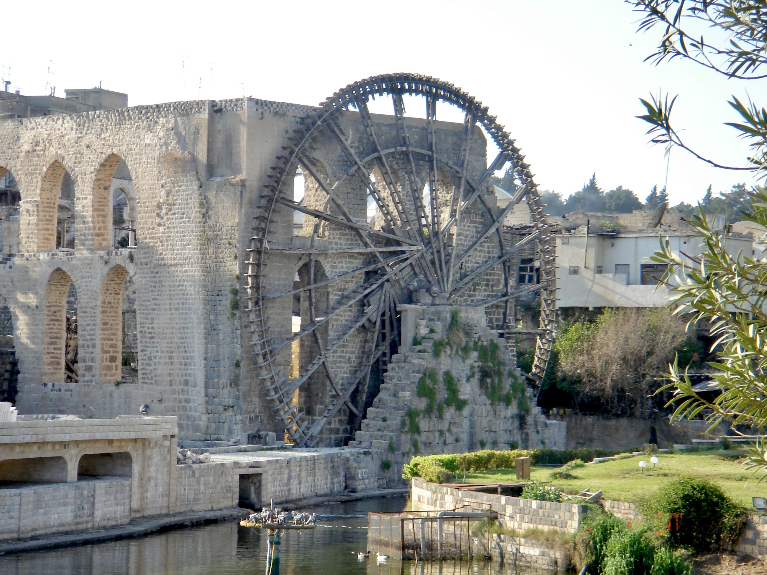 Naura (Noria) in Hama, Syrien.